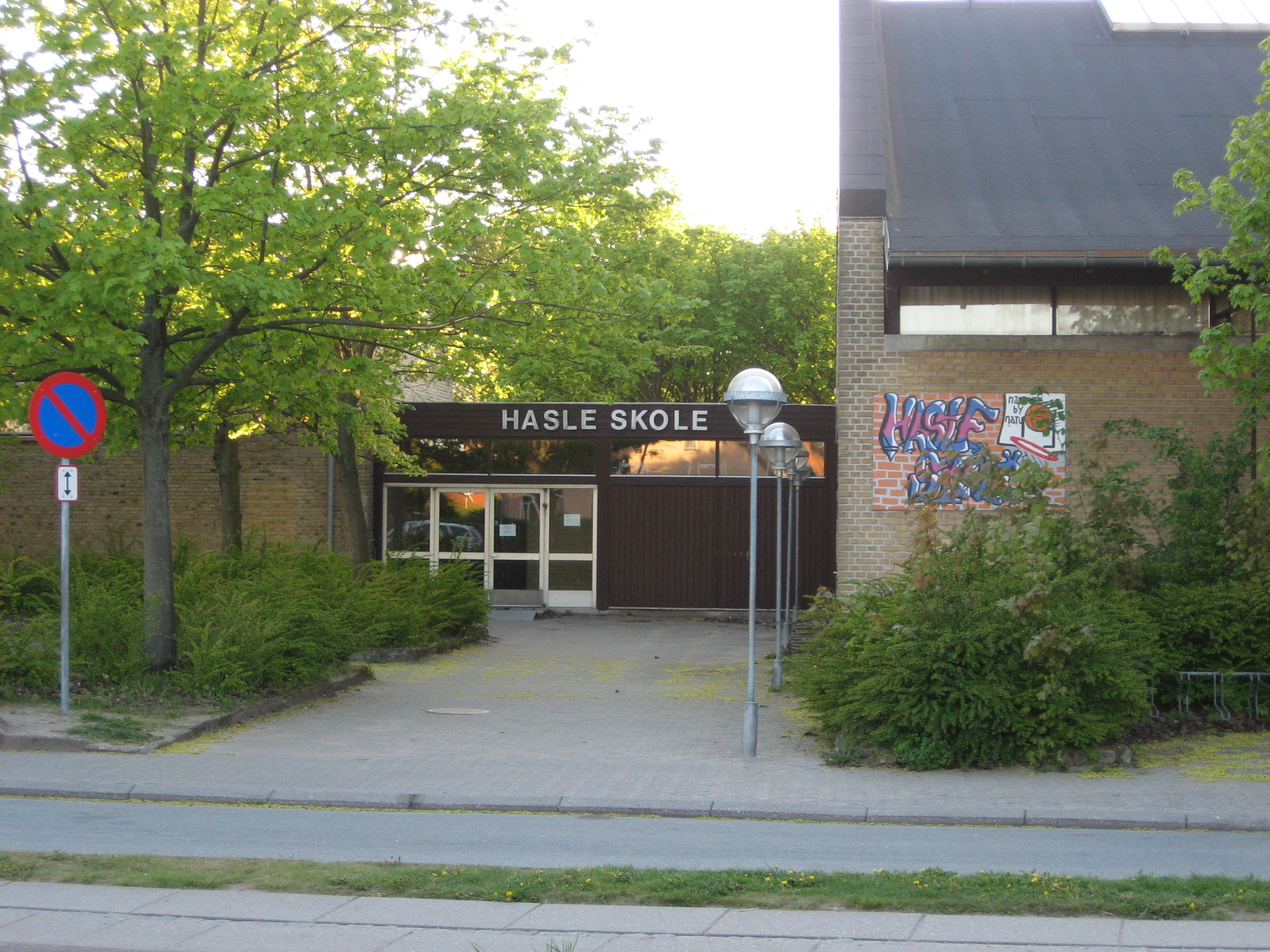 Hasle Skole in Hasle, Århus, Denmark.